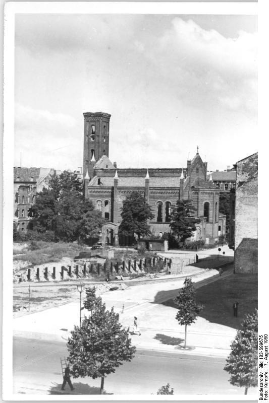 Berlin 1950. UBz: Die Neustädtische Kirche (Unter den Linden) Aufn.: Illus Kümpfel Be. 7496-50 3